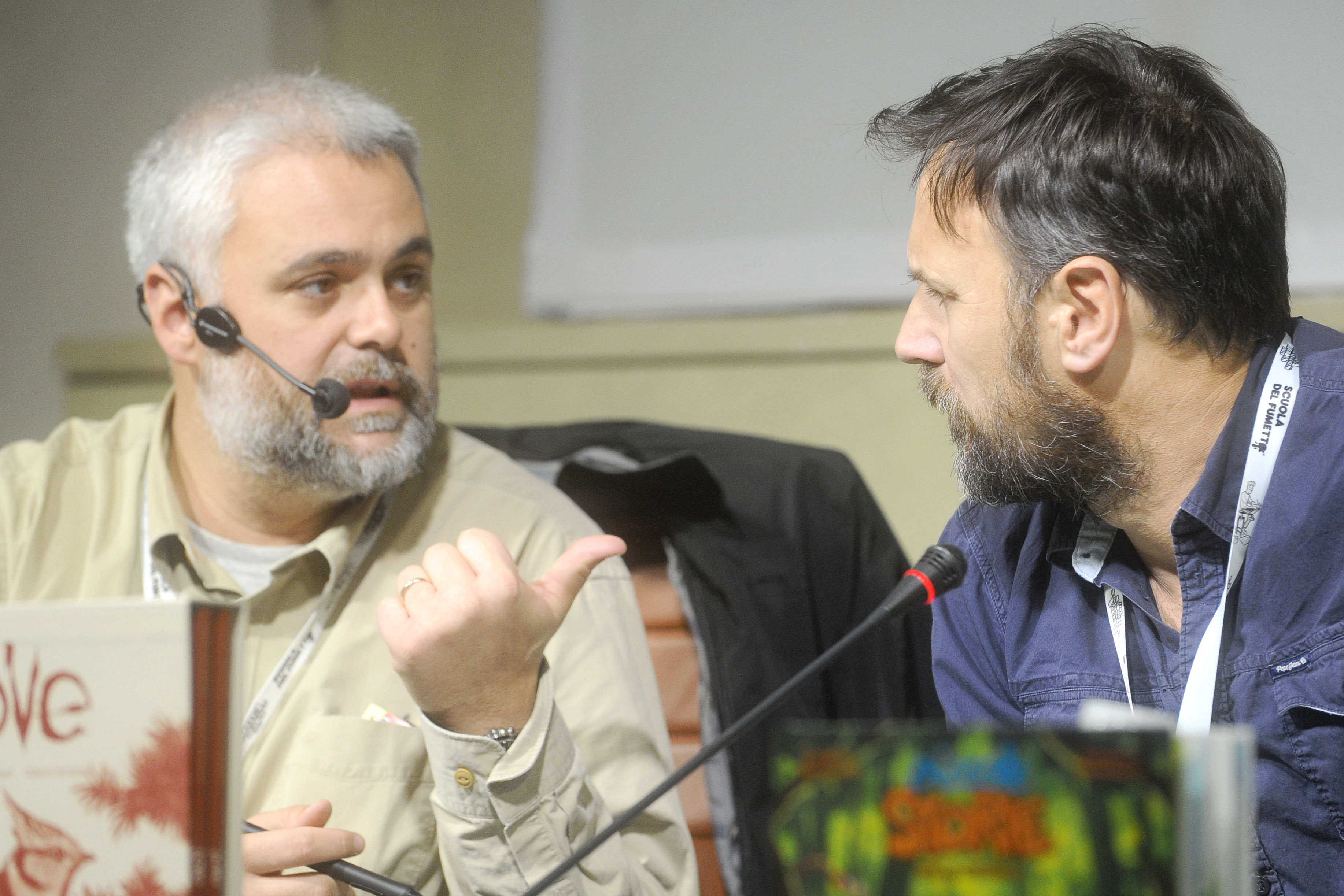 Federico Bertolucci e Brrémaud (Frédéric Brémaud). Sala Tobino. Lucca